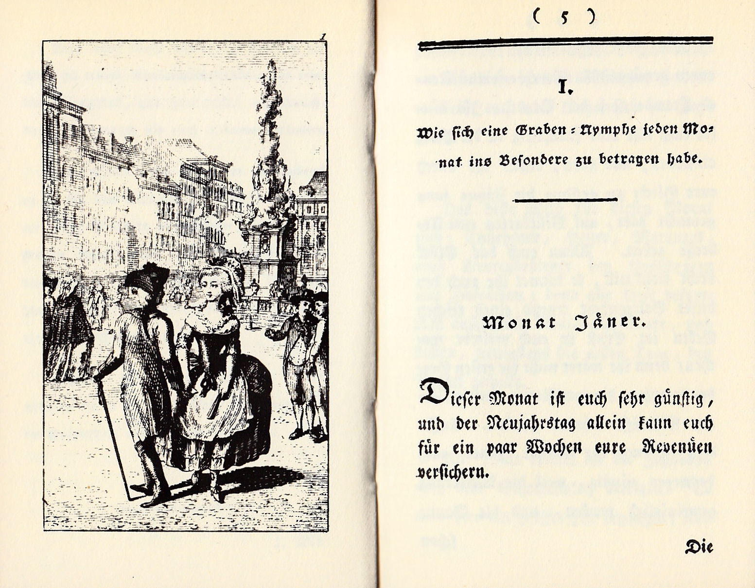 Anonym (Joseph Richter): Taschenbuch für Grabennymphen 1787. Grabennymphe vor der Pestsäule am Wiener Graben